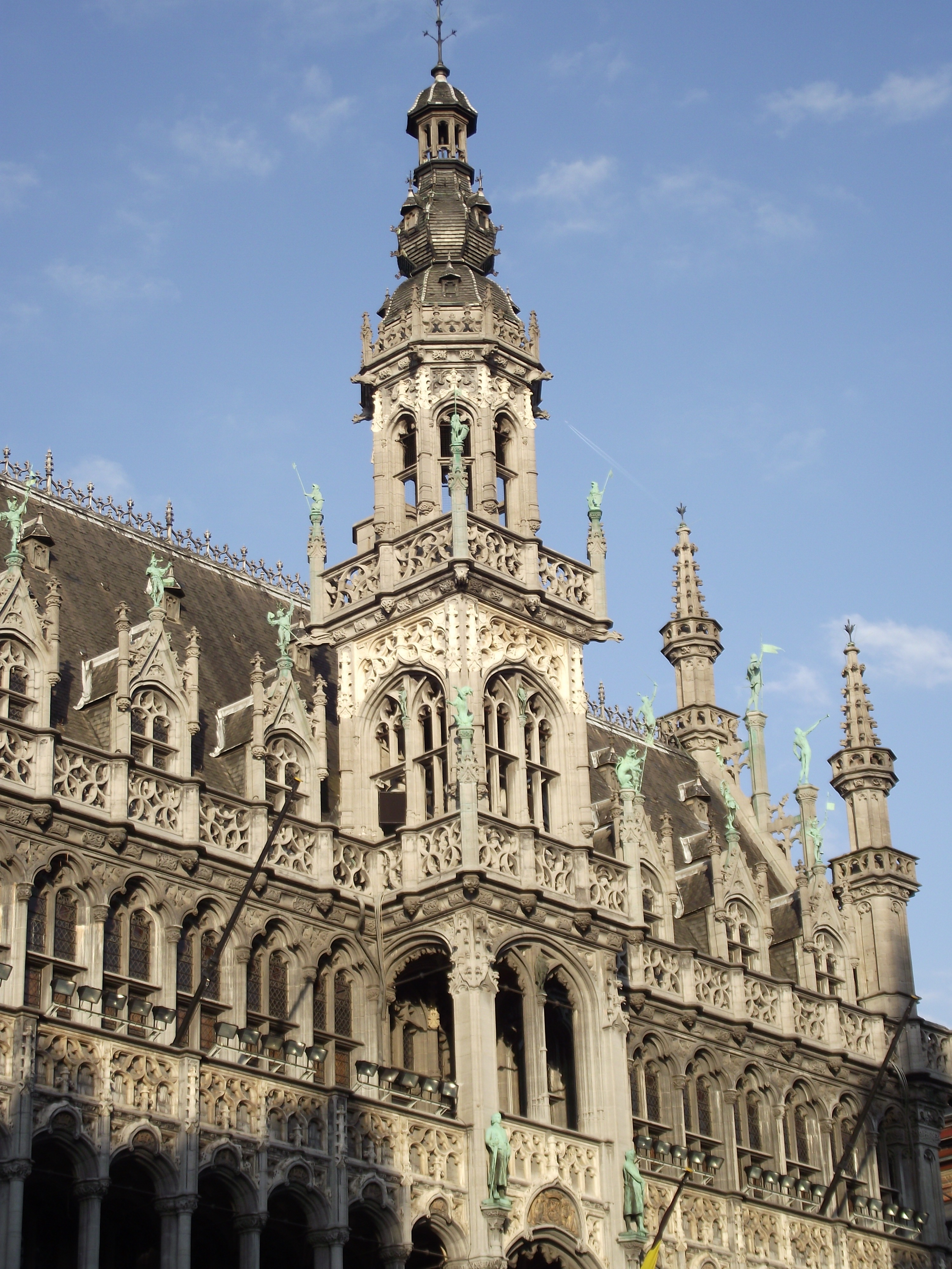 Bruxelles, Maison du Roi, Antoon II Keldermans 1515-36